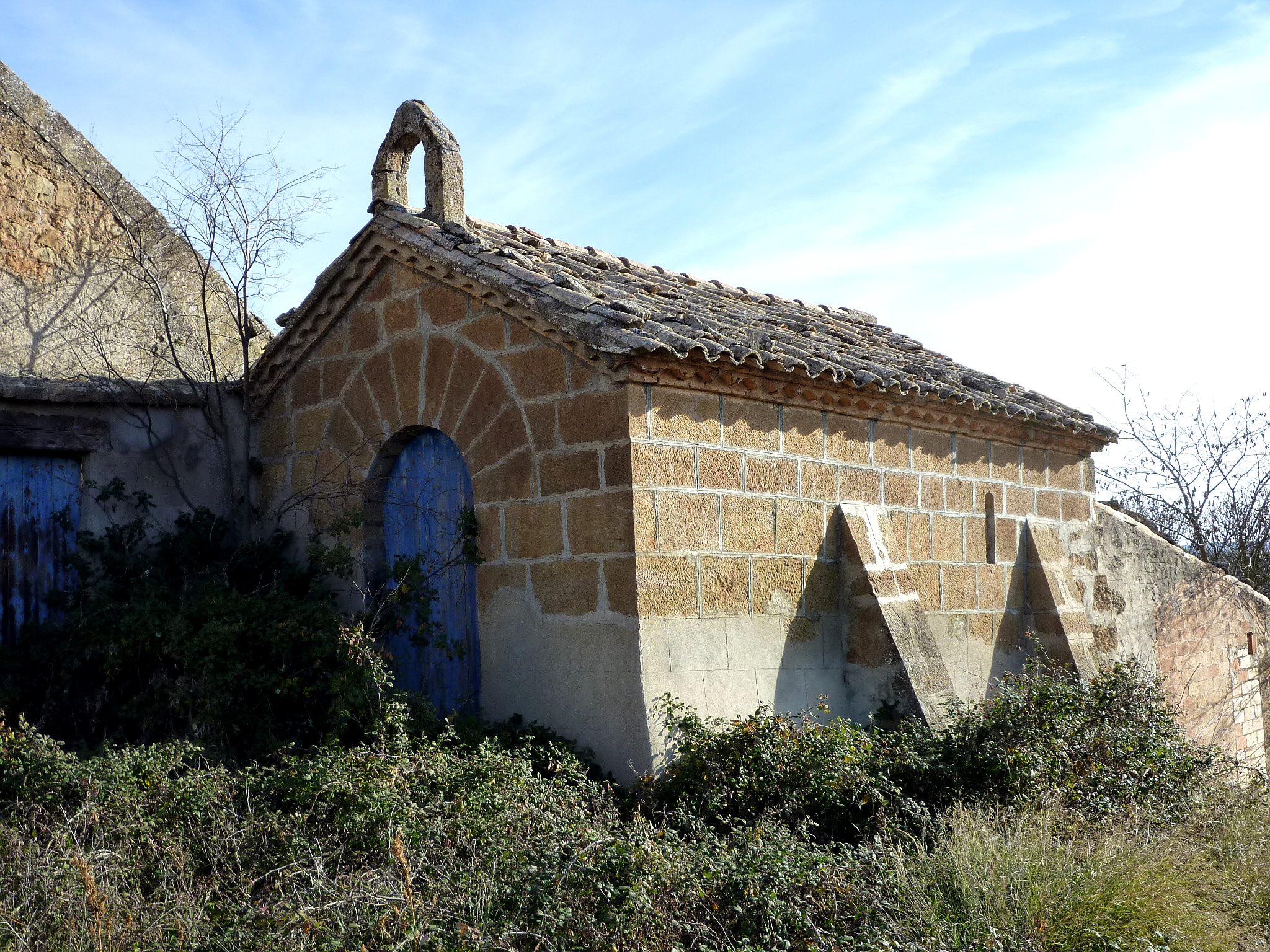 Mas de la Vila de les Cases de la Serra (Torrefeta i Florejacs): la capella